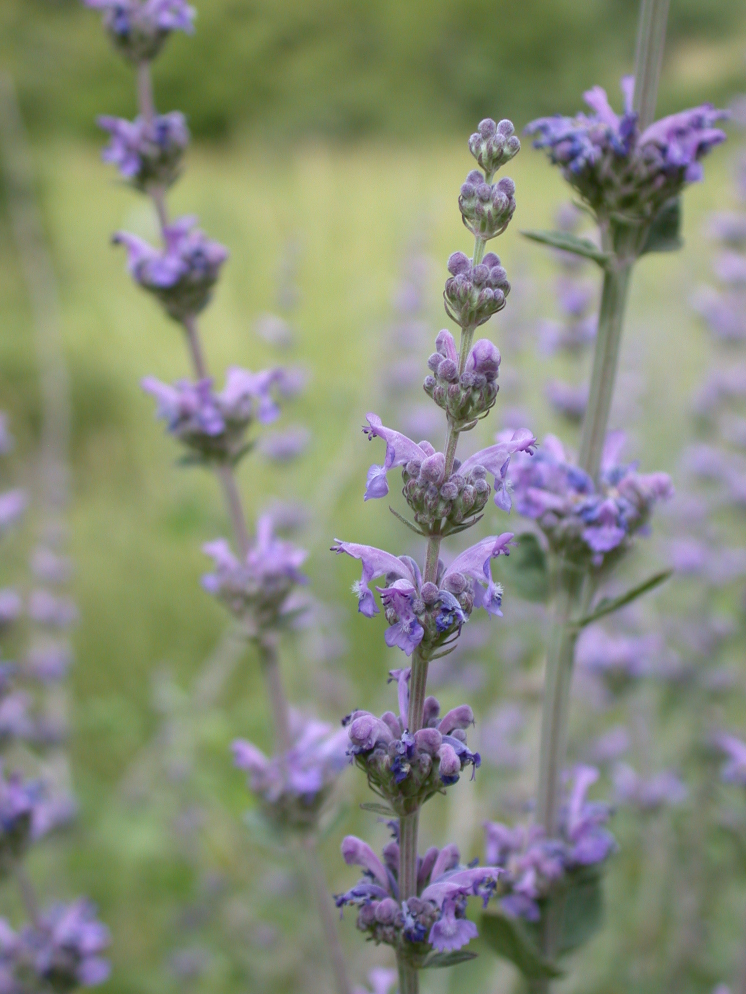 Nepeta curviflora Boiss. (נפית כפופה), Mount Carmel, Israel, May 7, 2006.